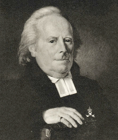 Anders Hylander (1750-1830)